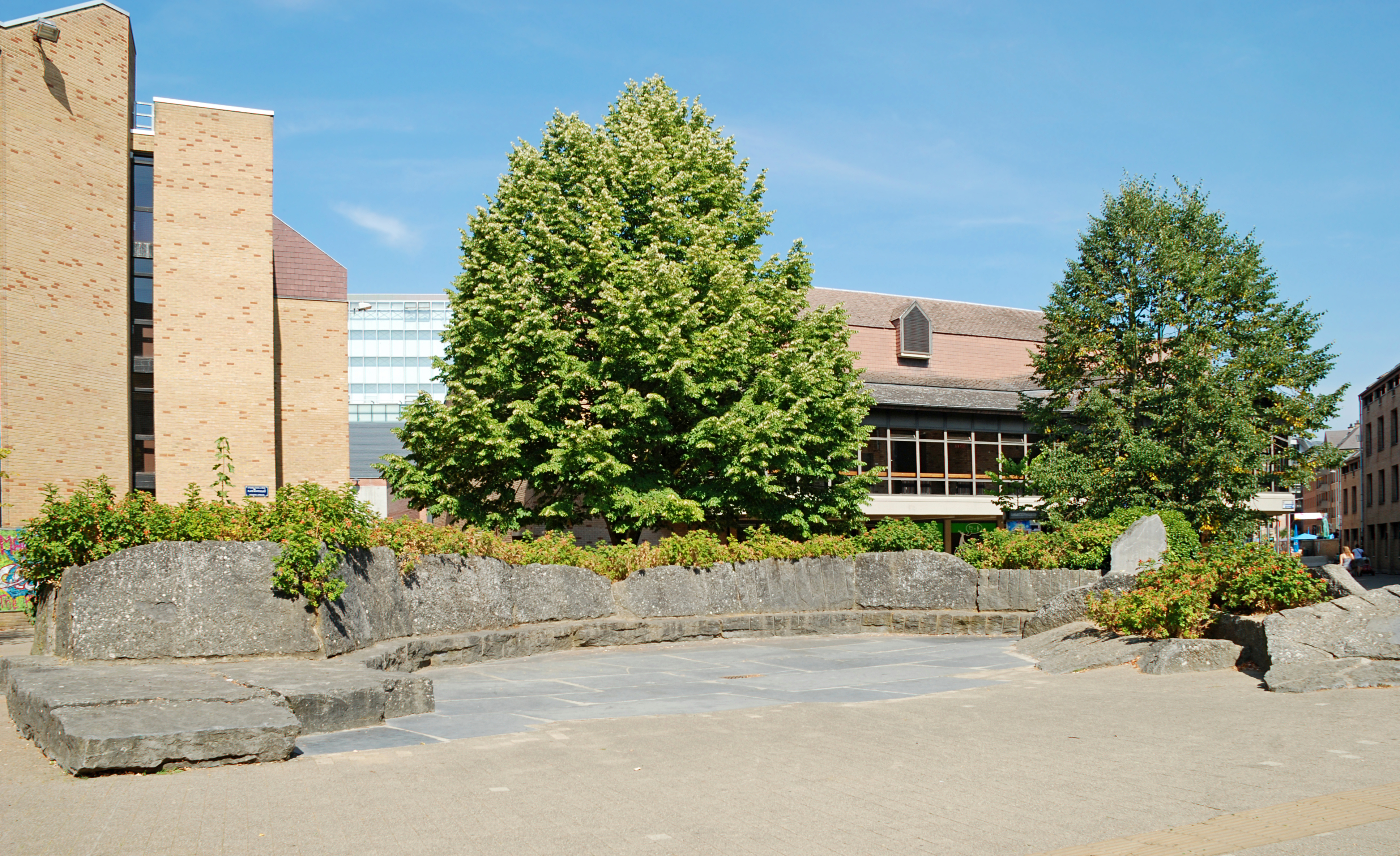 Belgique - Louvain-la-Neuve - Place Montesquieu - Ronde des menhirs (Pierre Culot 1980) This photo of immovable heritage has been taken in the Walloon Region